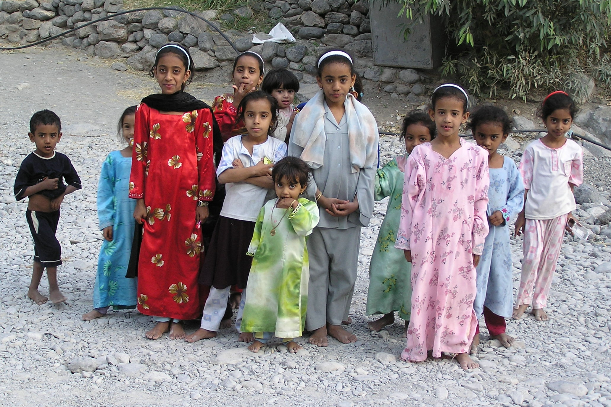 Children in Wadi Bani Awf, Oman. March 2004